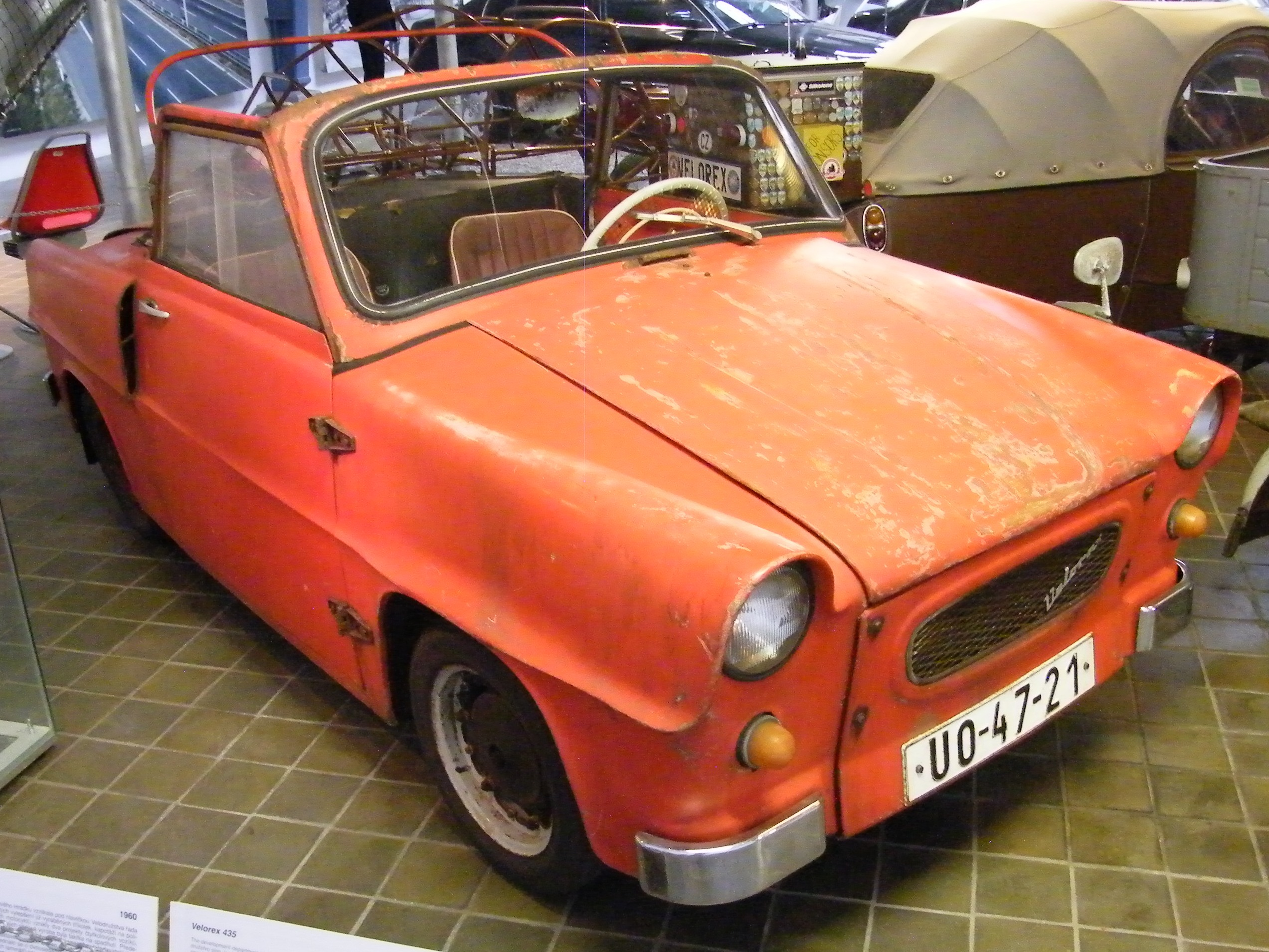 Velorex 435 350 ccm (1960) in NTM Prague